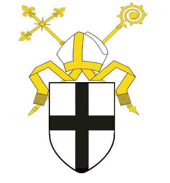 Wappen Bistum Fulda